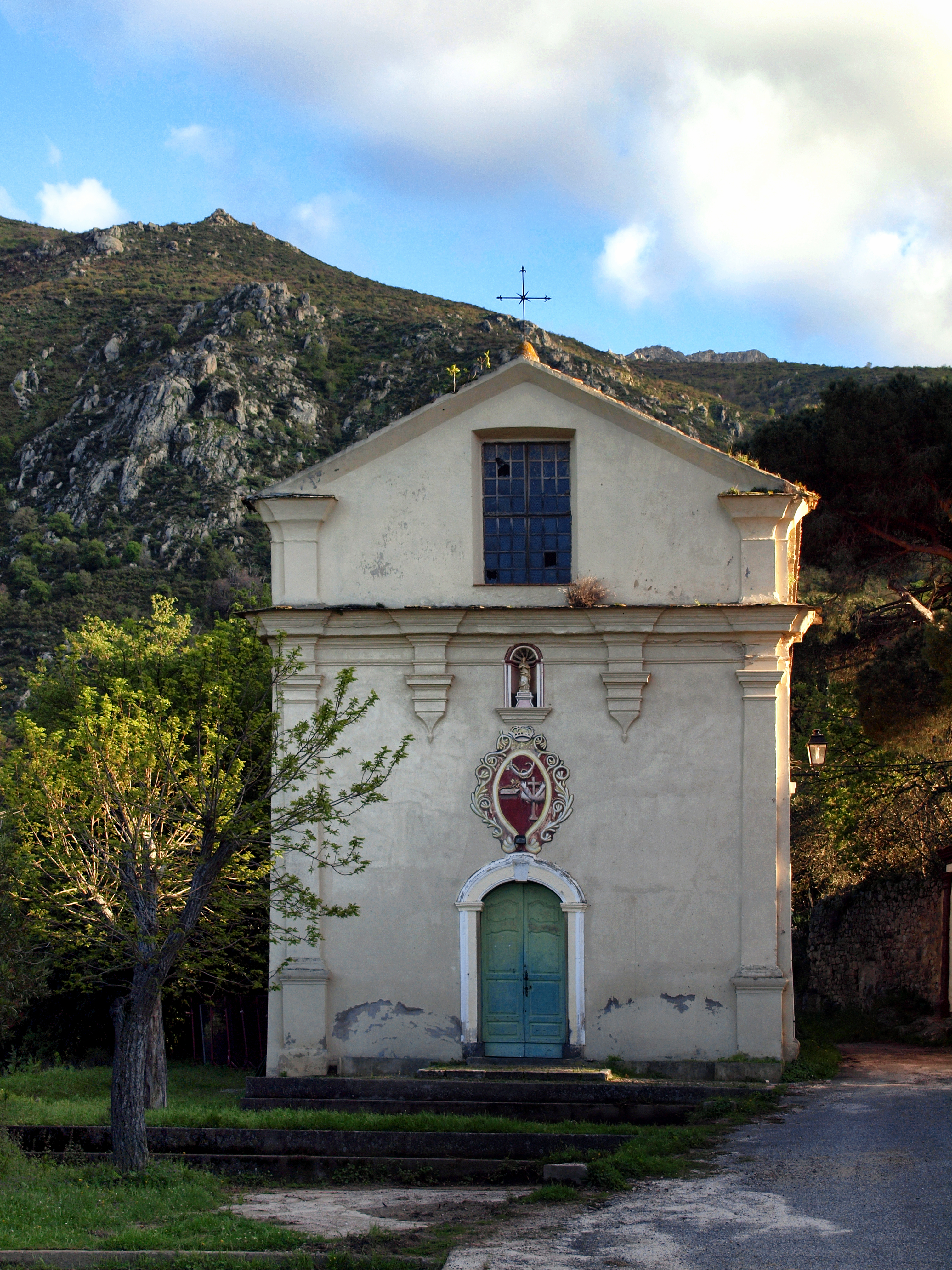 Ville-di-Paraso, Balagne (Haute-Corse) - Chapelle de confrérie Sainte-Croix (Santa Croce) à proximité de l'église paroissiale Saint-Siméon, à Mezzano.